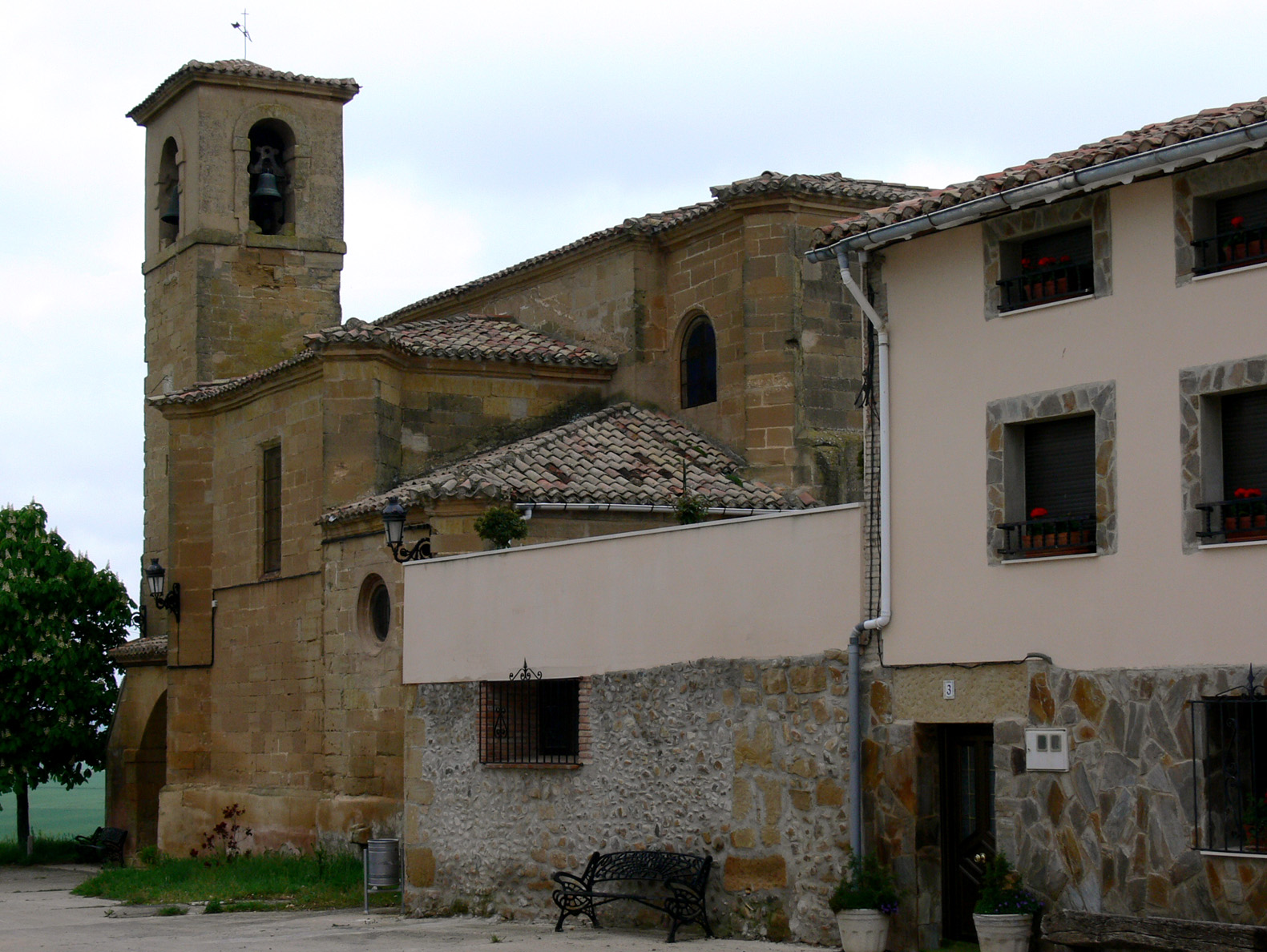 San Torcuato, municipio de La Rioja (España)